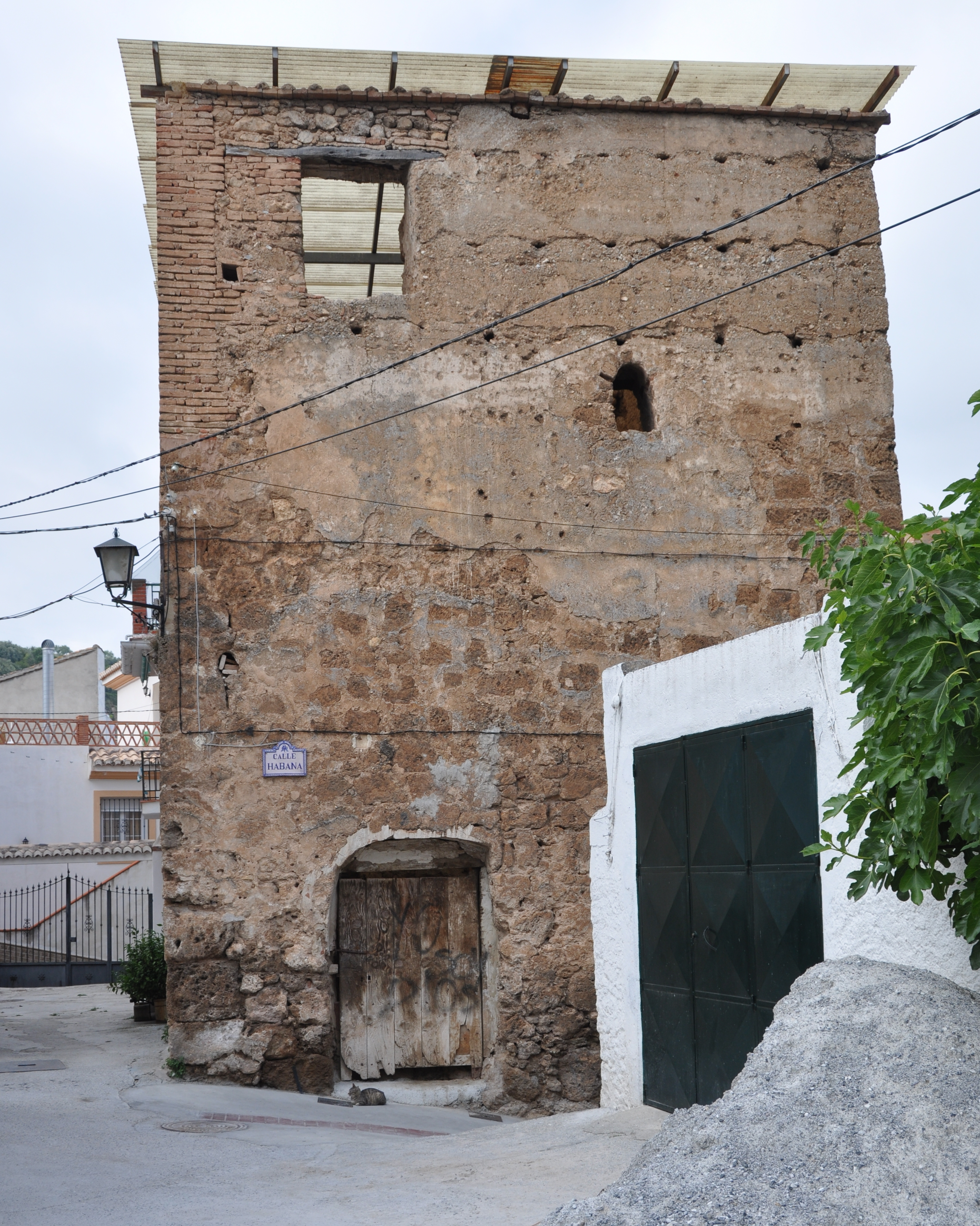 Albuñuelas